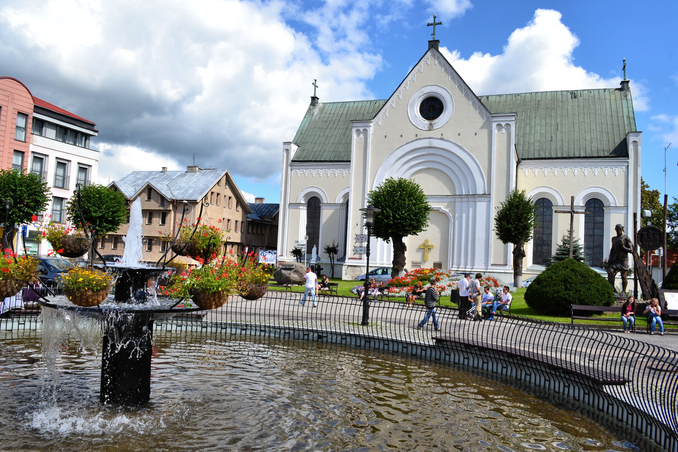 Czaplinek, Rynek - kościół pomocniczy pw. Podwyższenia Krzyża Świętego, klasycystyczny, bud. 1828-1830 (wg projektu Karla F. Schinkla)